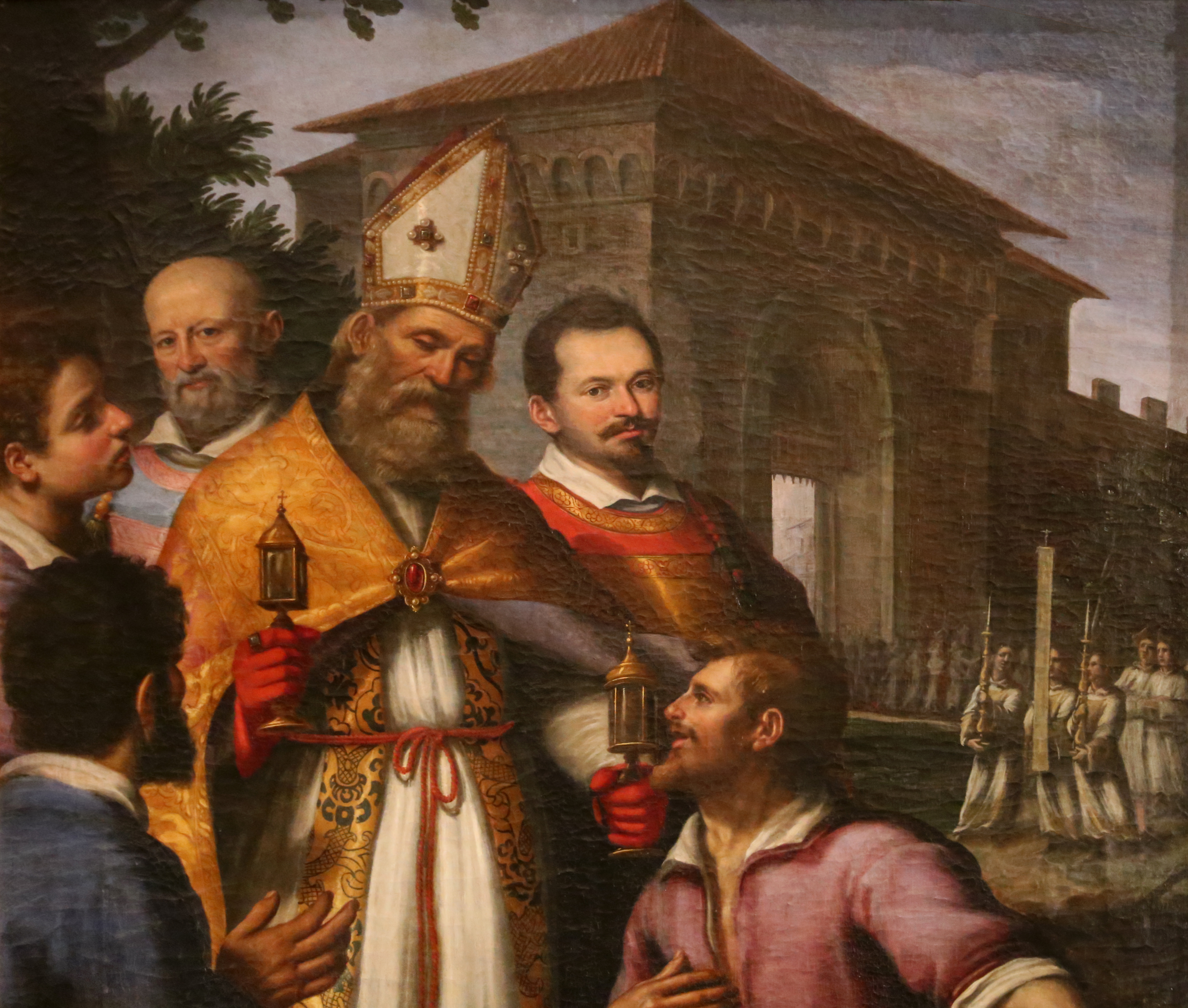 abbazia di San Mercuriale This is a photo of a monument which is part of cultural heritage of Italy.